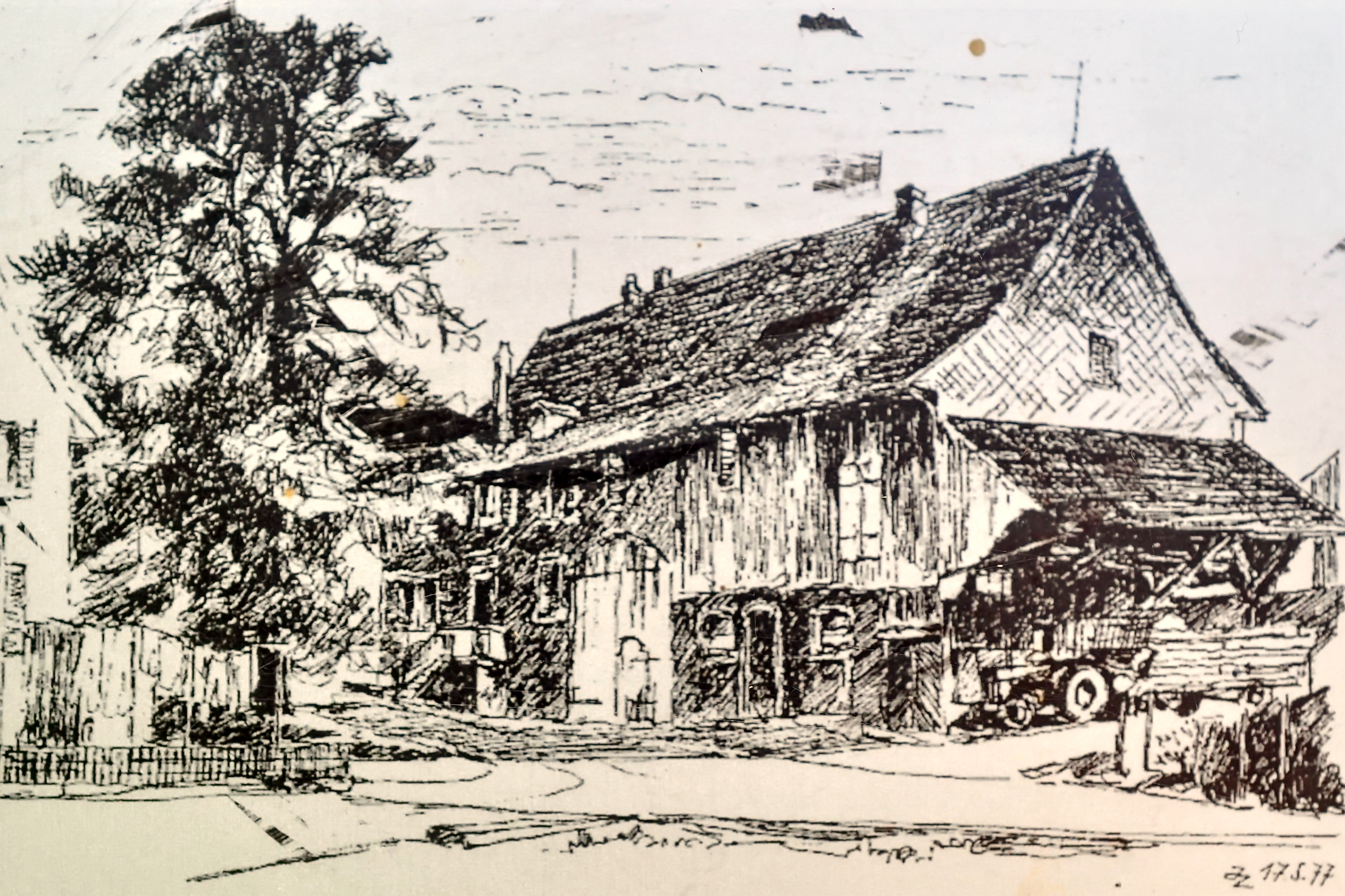 Jakob Messikommer, Robenhausen in Wetzikon (Switzerland) : Wohnhaus in Stegen bei Robenhausen, Skizze von Jakob Zollinger (17.5.1877).